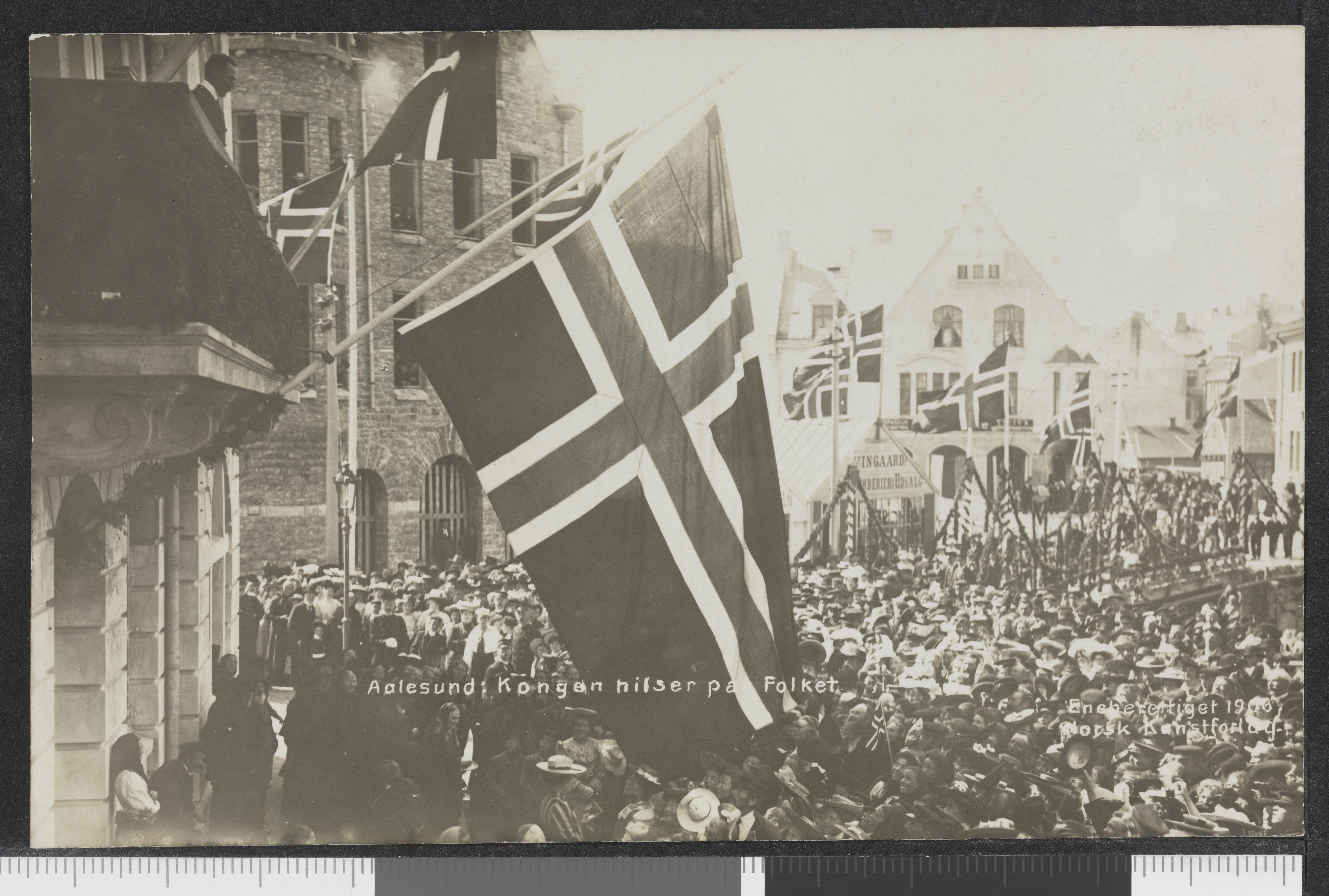 Bildet er hentet fra Nasjonalbibliotekets bildesamling Ålesund, Møre og Romsdal Depicted person: Haakon VII konge av Norge